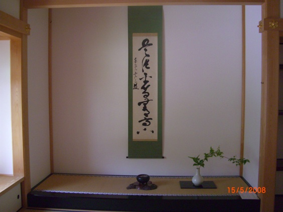 Tokonoma in a residence in Enkakuji Temple in Kita Kamakura